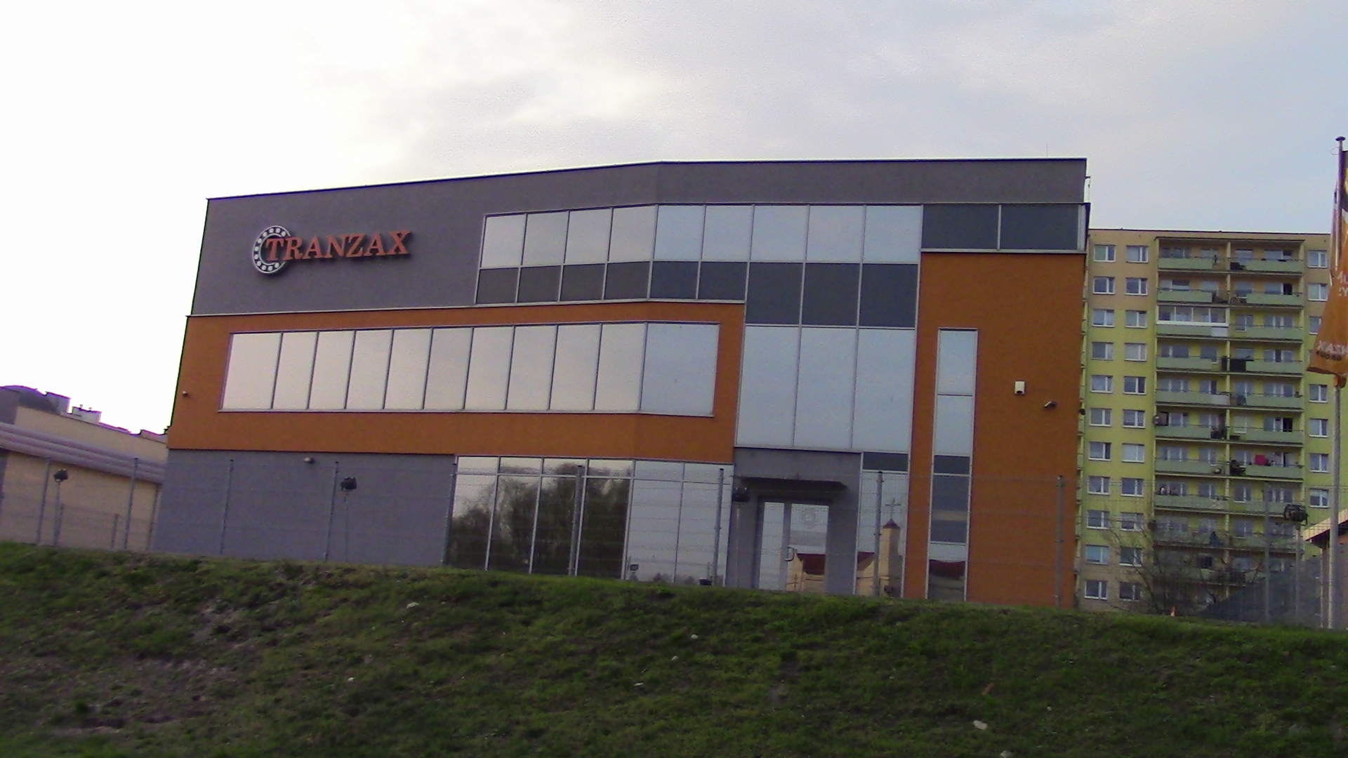 Tranzax